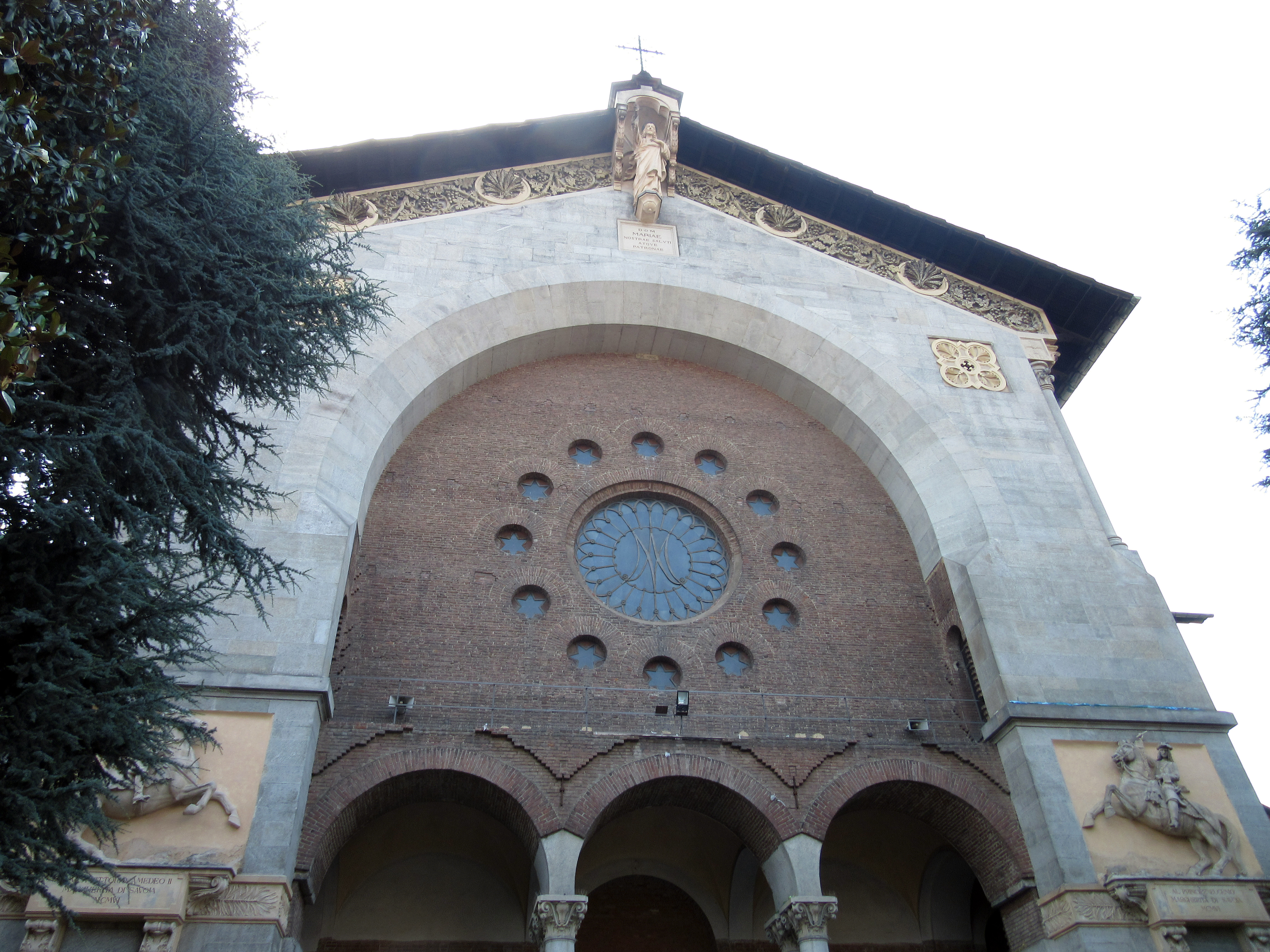 Torino, Borgo Vittoria, Chiesa di Nostra Signora della Salute, facciata, scorcio.